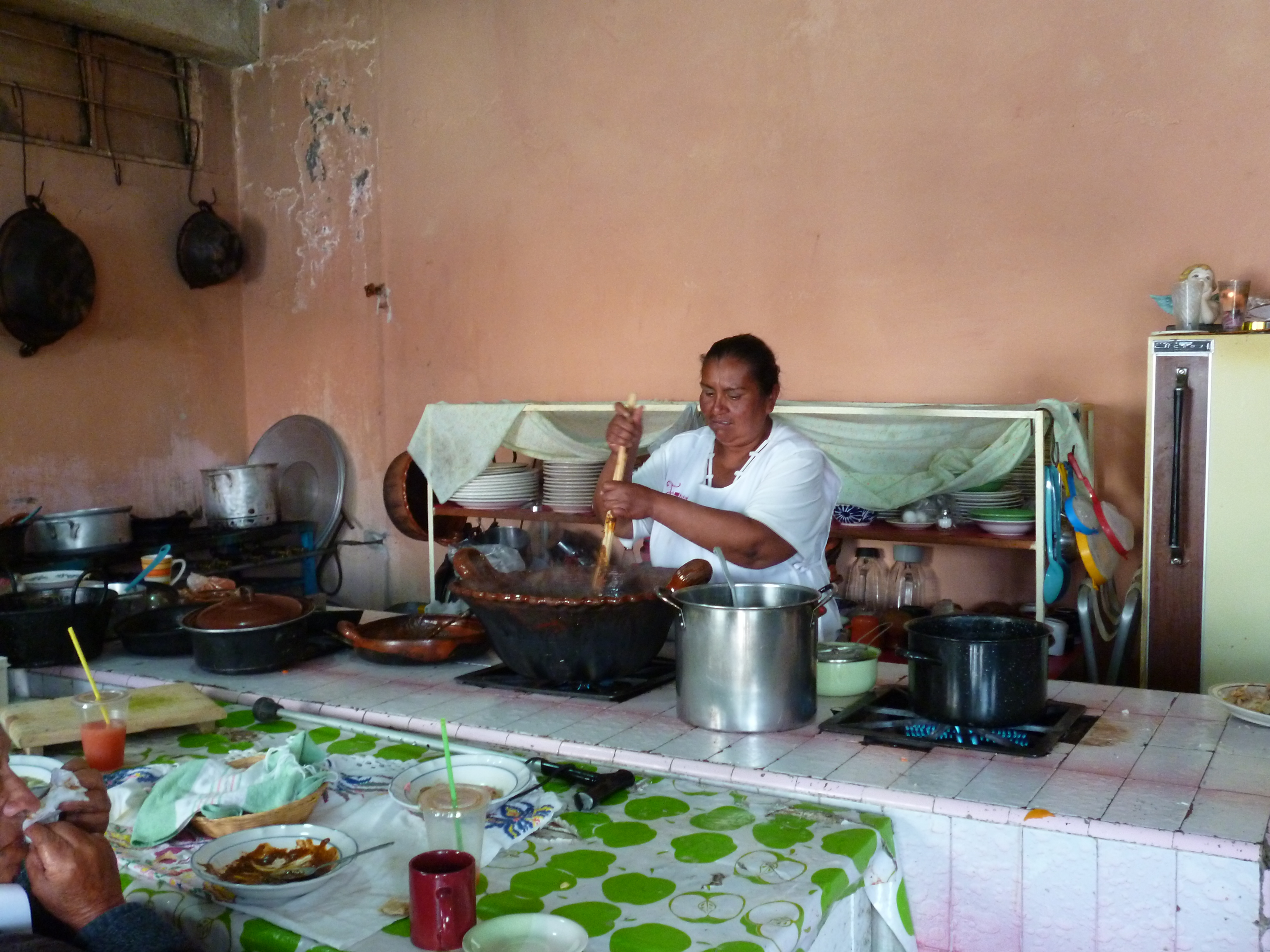 cocina de un restaurante en San Pedro Atocpan, Distrito Federal, México, en la que se está preparando mole